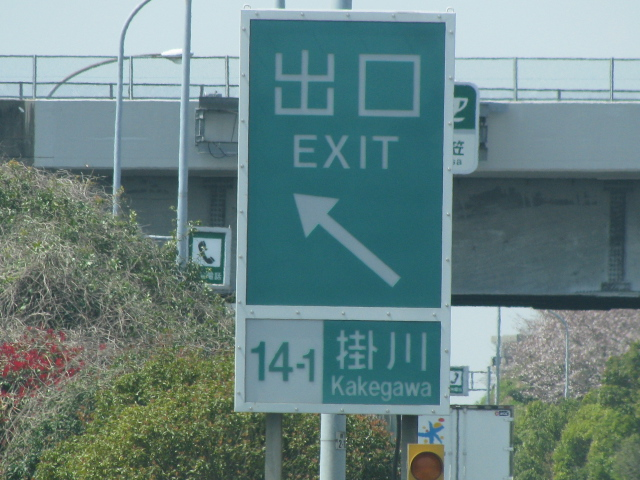 2009年4月1日、掛川IC付近で撮影。奥が名古屋方面